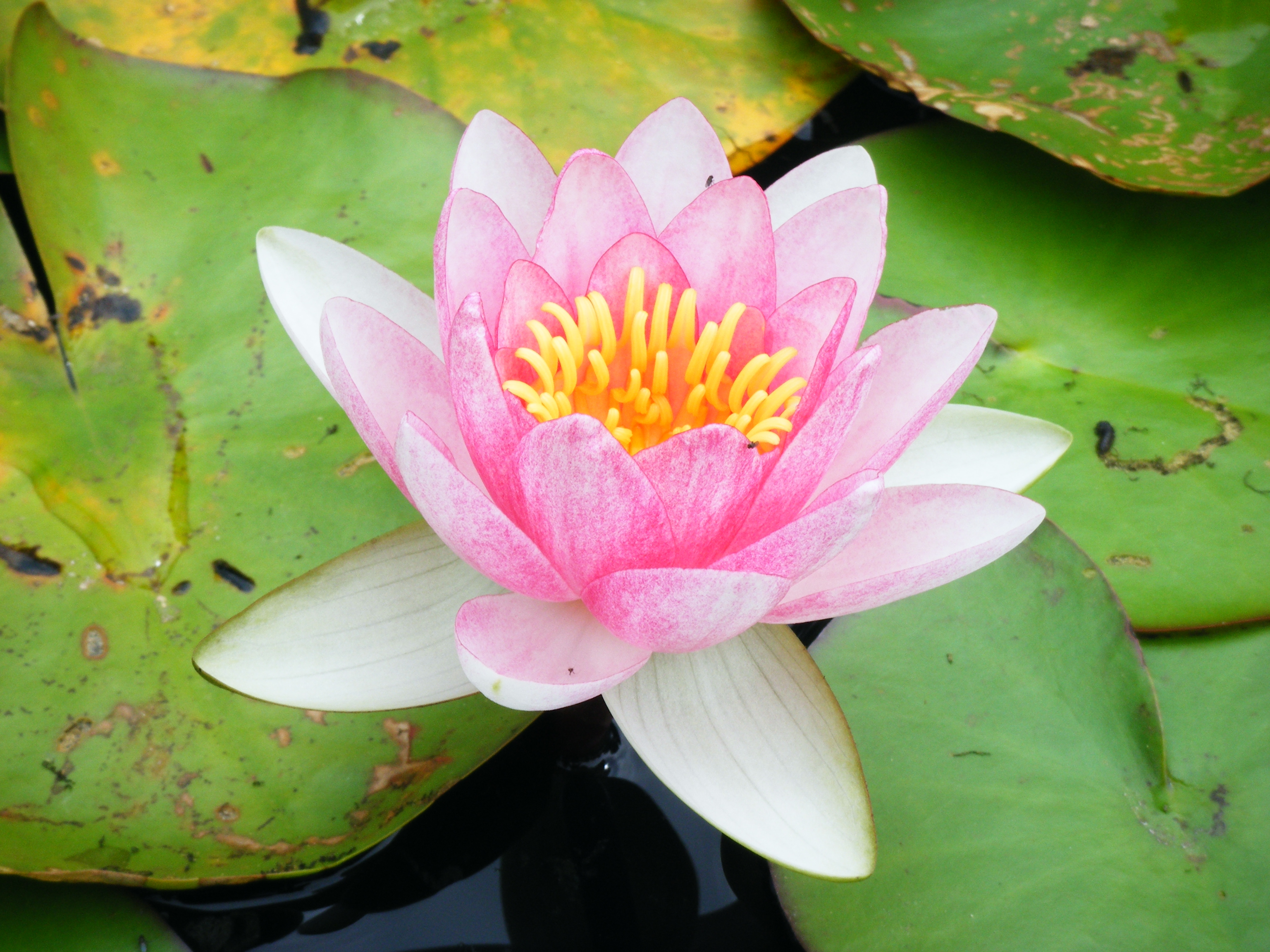 fleurs de lotus